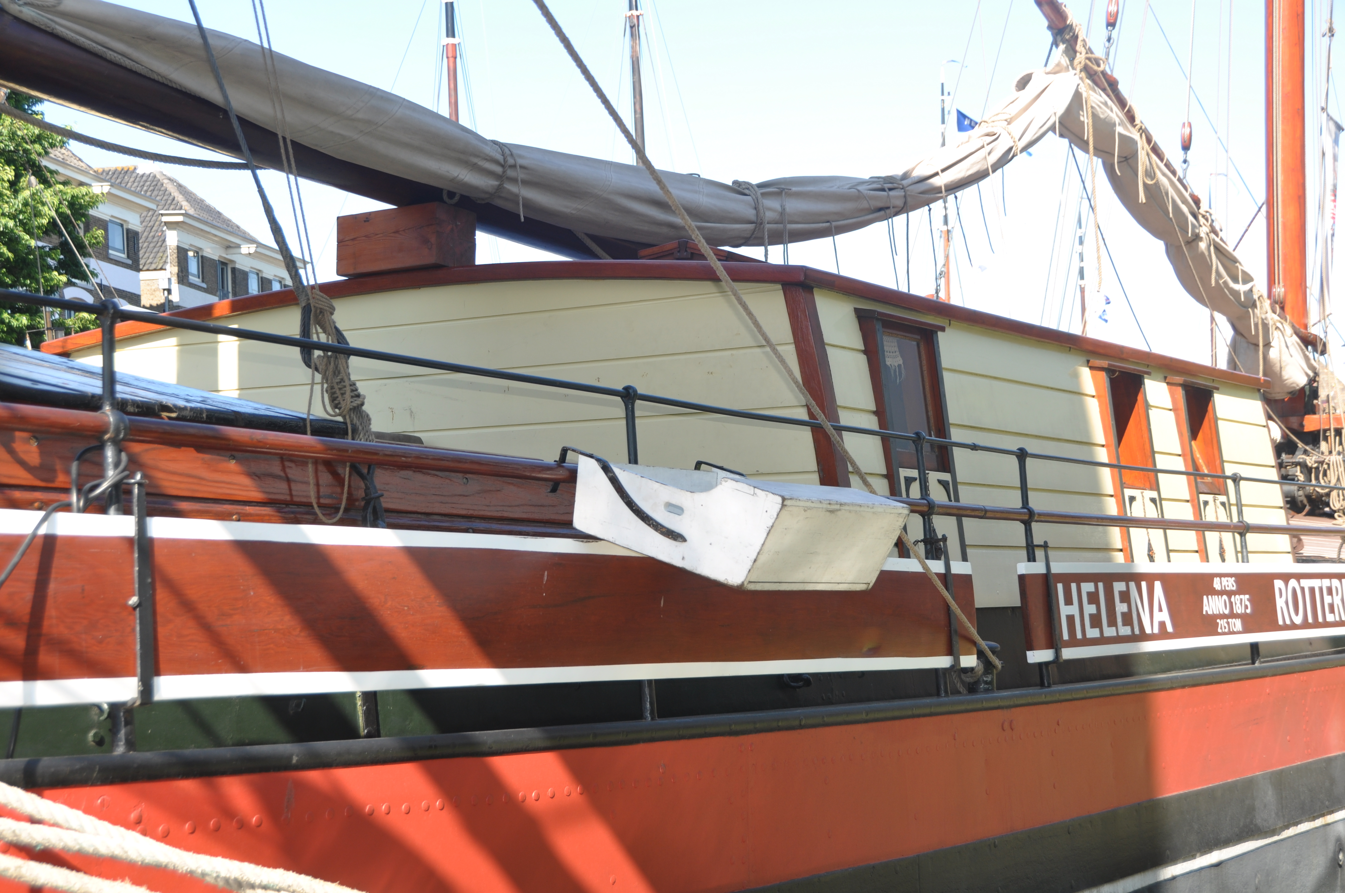 De HELENA bij de Havendagen in Gouda.